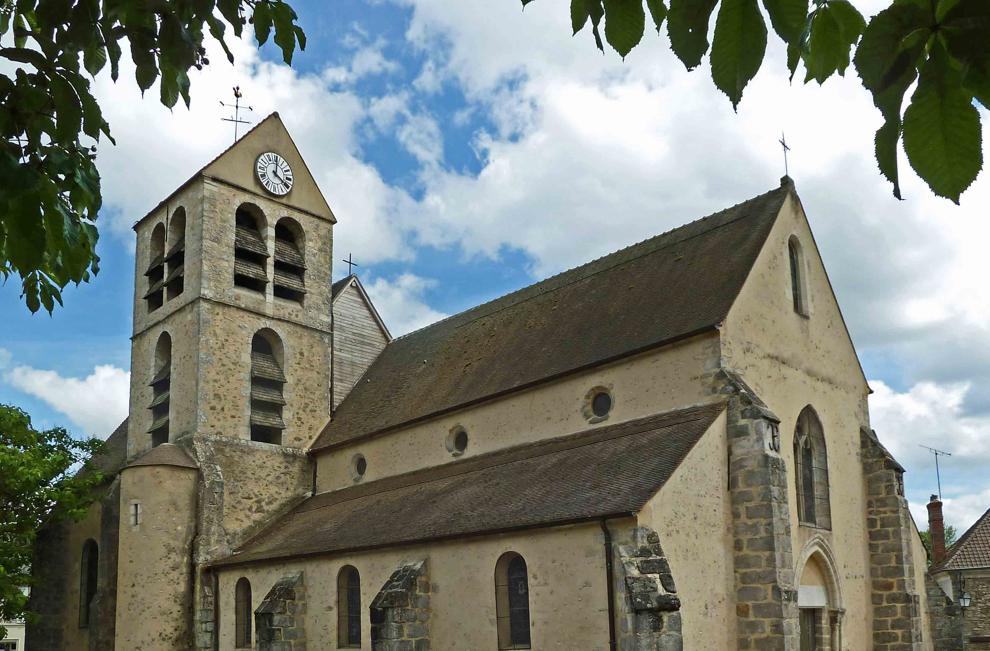 91 Lardy